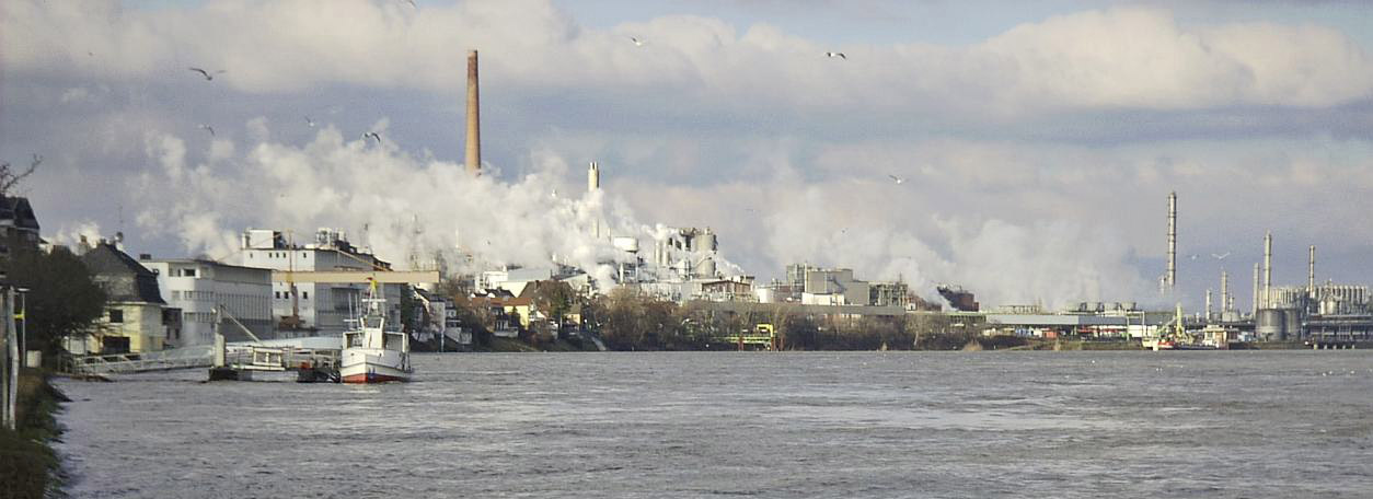 Wesseling Rhäinufer.